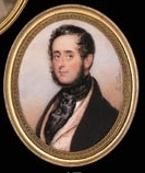 Portraitmedaillon, gemalt von Emmanuel Thomas Peter